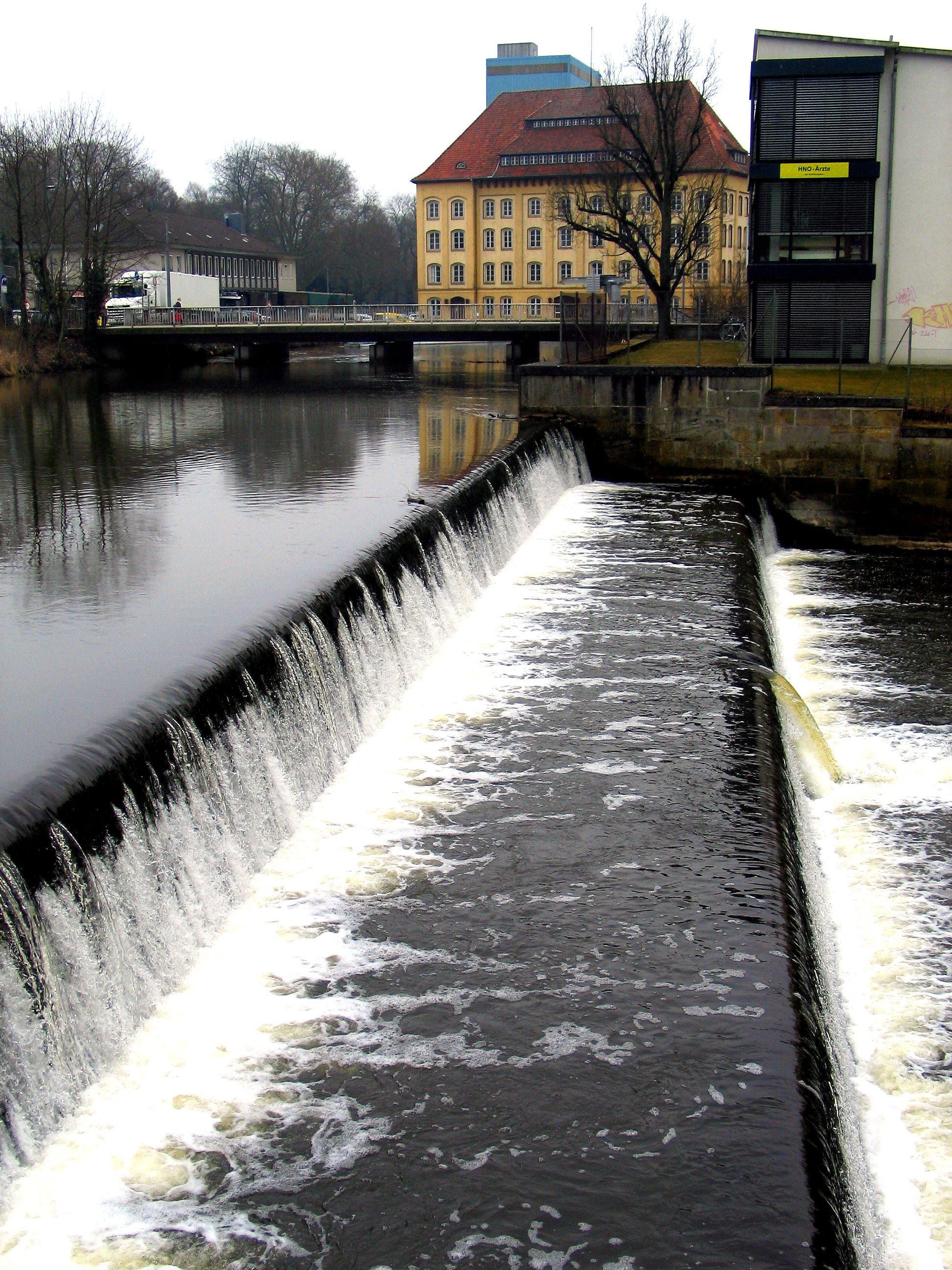 Das 1937 erneuerte große feste Überfallwehr zum Aller-Nordarm ist ebenso denkmalgeschützt wie die gesammte Walzenwehr-Anlage in Celle. Ganz im Hintergrund die Gebäude der ehemaligen Ratsmühle ...